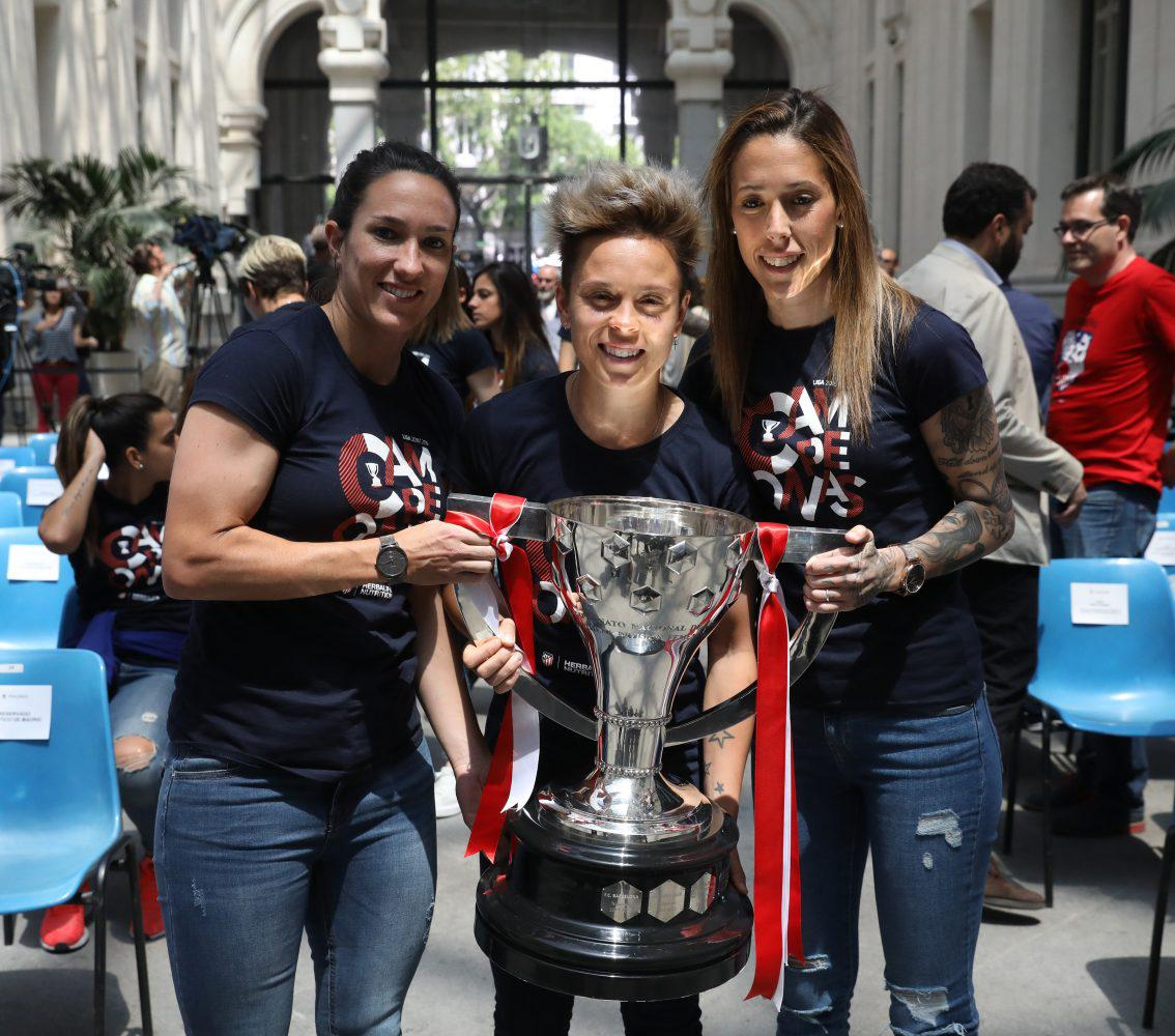 La alcaldesa de Madrid, Manuela Carmena, ha recibido hoy en el Ayuntamiento de Madrid al equipo de fútbol femenino del Atlético de Madrid, campeón de la Liga Iberdrola 2019, en un acto muy emotivo en el que ha felicitado a los integrantes del club y a todas las jugadoras agradeciendo su esfuerzo y la grandeza del logro deportivo. “Habéis ganado la liga. Habéis ganado Madrid. Habéis ganado nuestro corazón, porque os queremos mucho”, subrayó la alcaldesa, que ha recibido una camiseta oficial del equipo homenajeado.